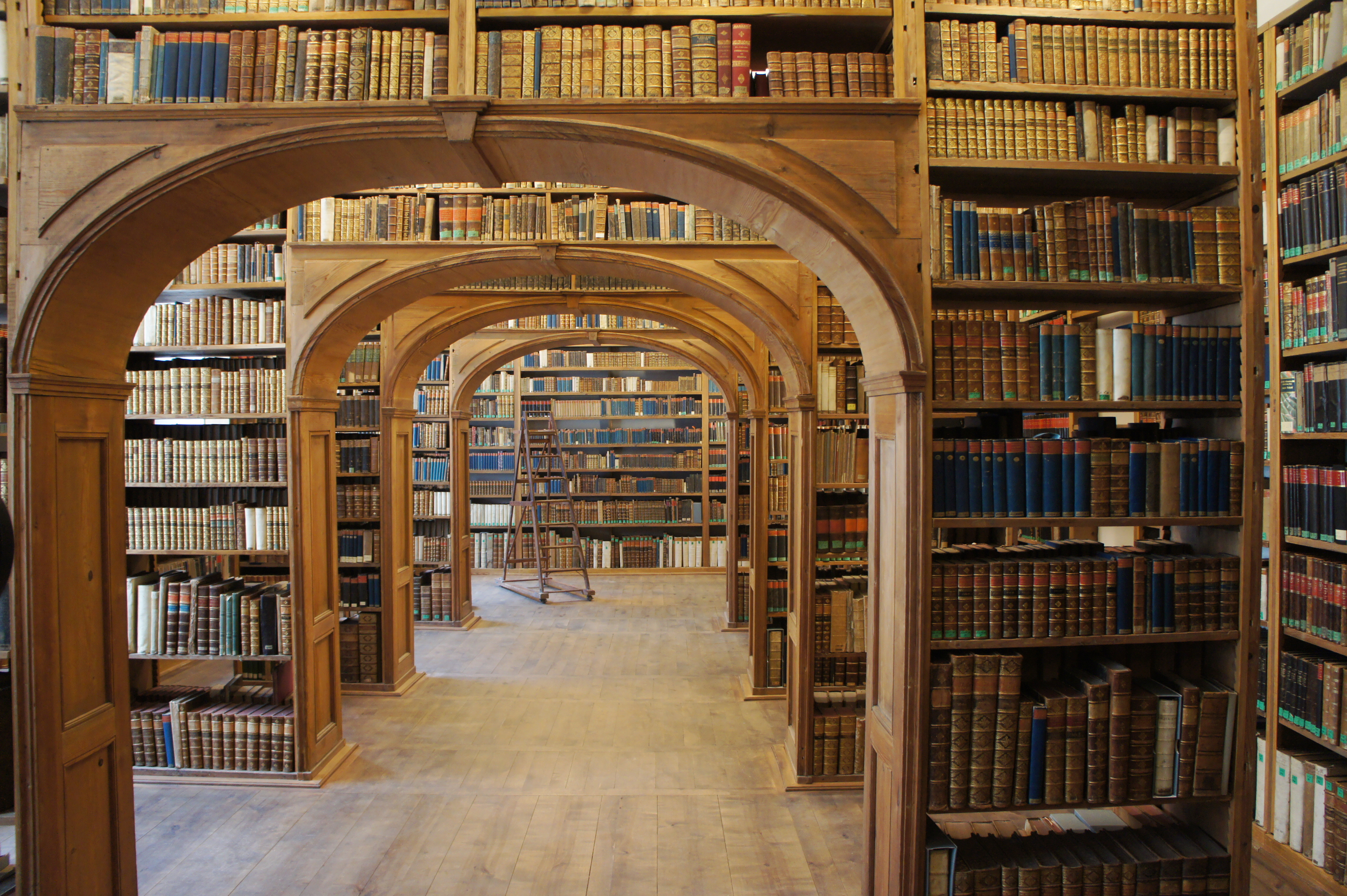 Oberlausitzische Gesellschaft der Wissenschaften, Neißstraße 30, Görlitz. Bibliothek der Gesellschaft nach der Sanierung 2011